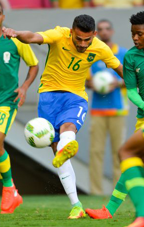 Futebol olímpico do Brasil estreia contra África do Sul